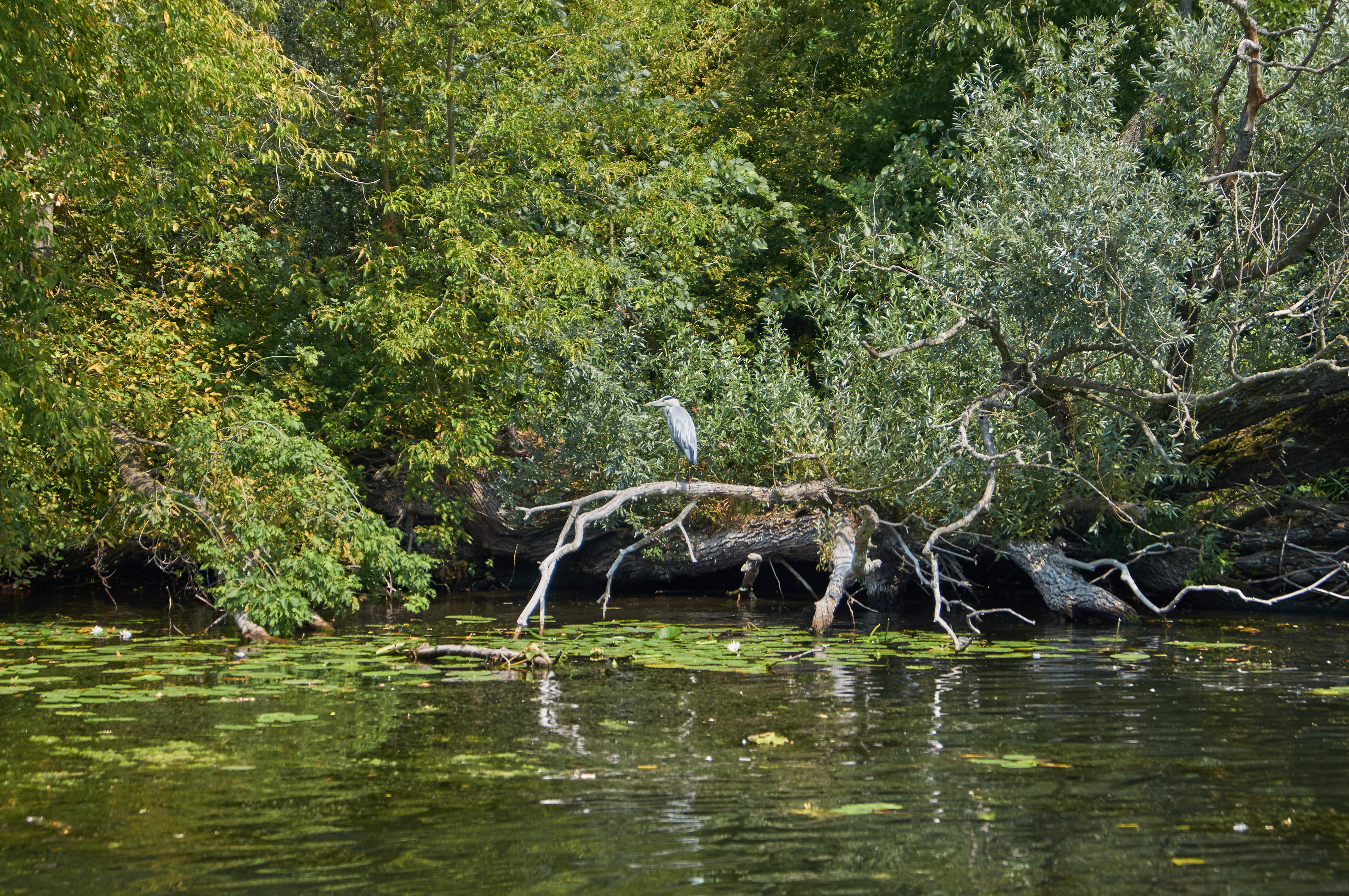 Naturschutzgebiet Stadthavel mit Graureiher.